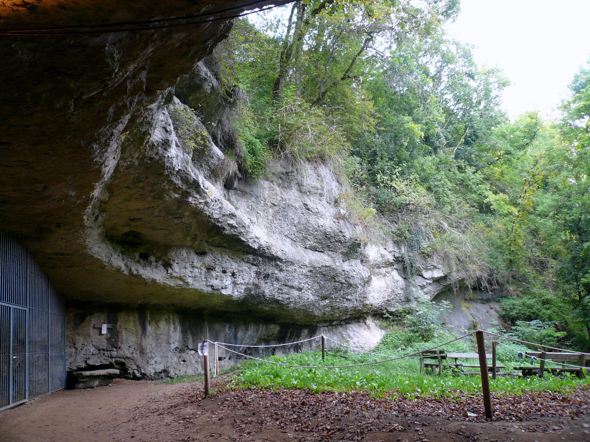 Sophienhöhle, Eingang